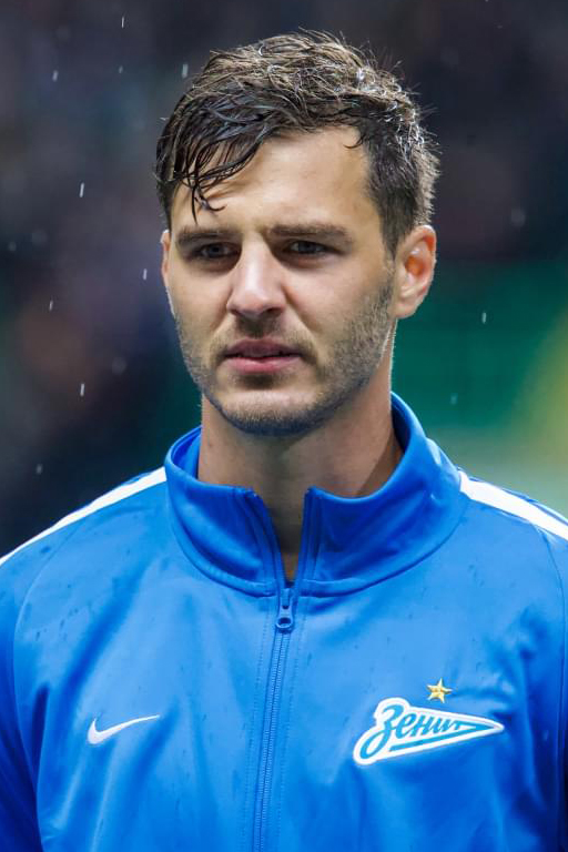 15.02.2018. Великобритания, Глазго, «Селтик Парк». Лига Европы УЕФА 2017/18, «Селтик» — «Зенит».